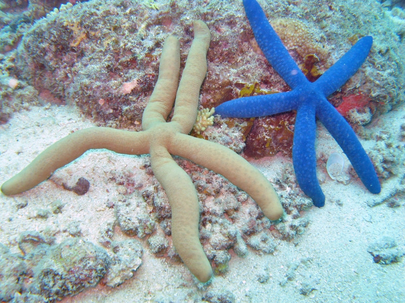 Linckia guildingi (verdosa) y Linckia laevigata (azul) en isla Lizard, Australia